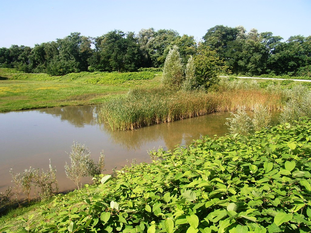 Etang de la source du Rouillon à Villejust (91)